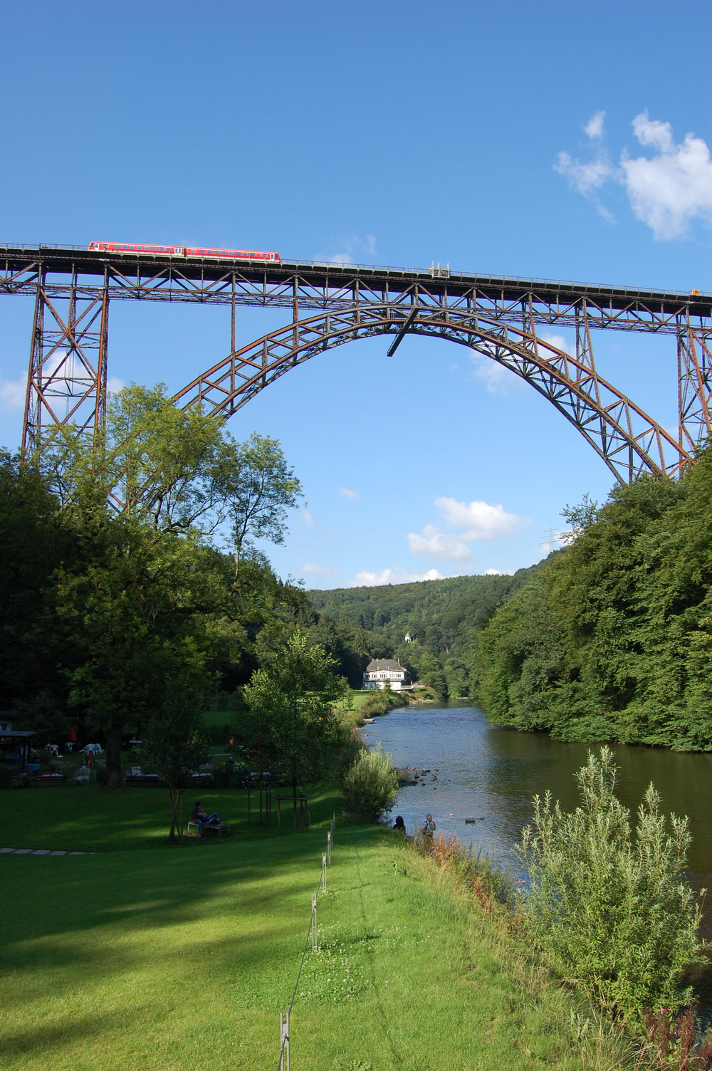 Müngstener Brücke. Darunter der neue Brückenpark.